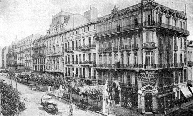 Vista de la vereda norte de Avenida de Mayo, desde la calle Perú hacia Chacabuco en Buenos Aires. En la esquina, el edificio de La Positiva, luego tienda El Coloso, demolido en 1968.